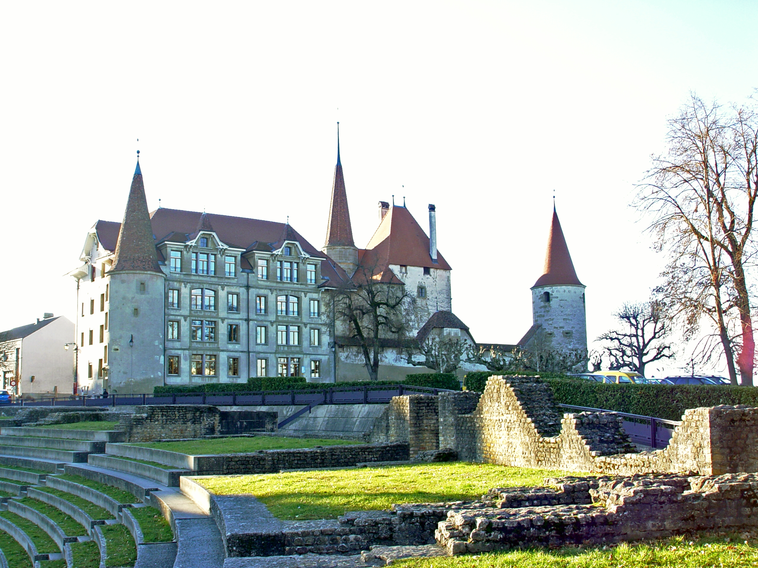 Altstadt von Avenches vom Amphitheater gesehen